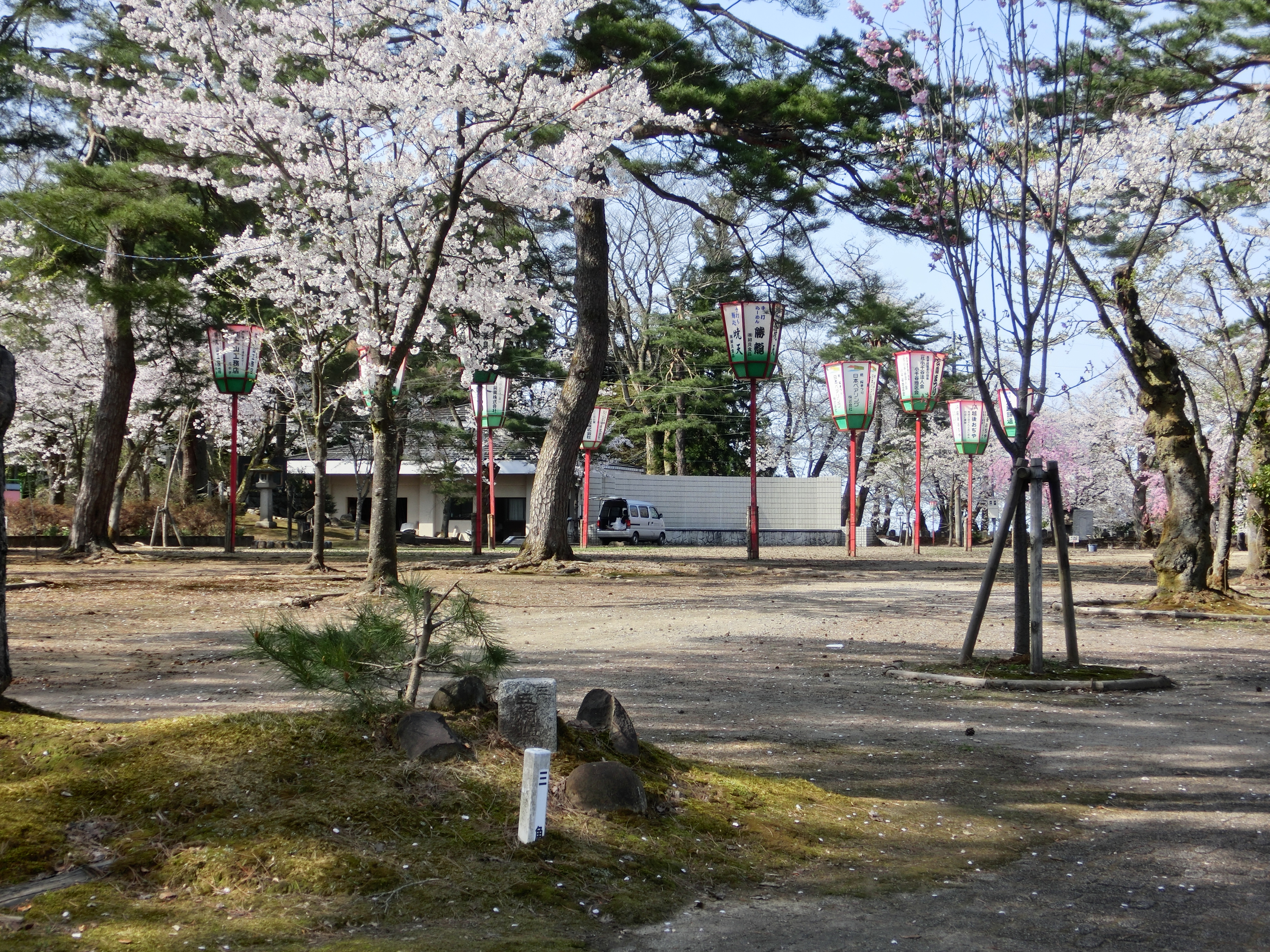 この画像は2018年4月19日投稿者自身によって新潟県小千谷市稲荷町船岡公園内にて撮影された船岡山山頂三角点、及び船岡公園広場。